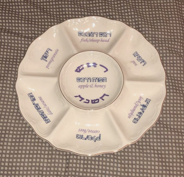 קערה טיפוסית להגשת המאכלים המסורתיים בסעודת "סדר ראש השנה"